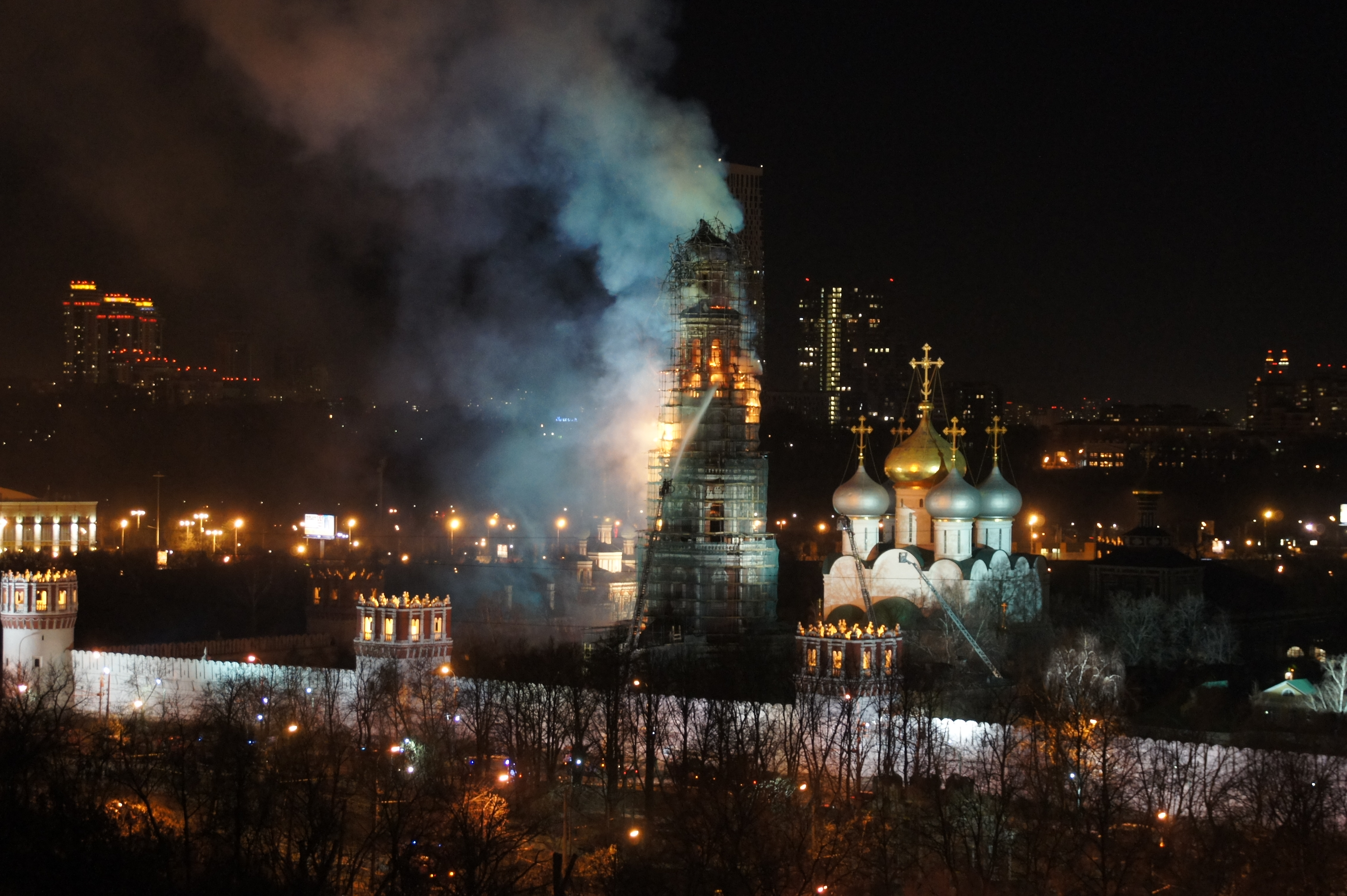 Новодевичий монастырь. Пожар на колокольне